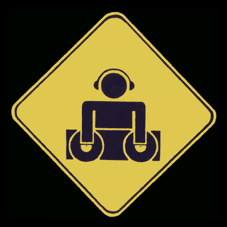 DJ logo. Ja jestem autorem tej grafiki i ja posiadam do niej prawa autorskie.